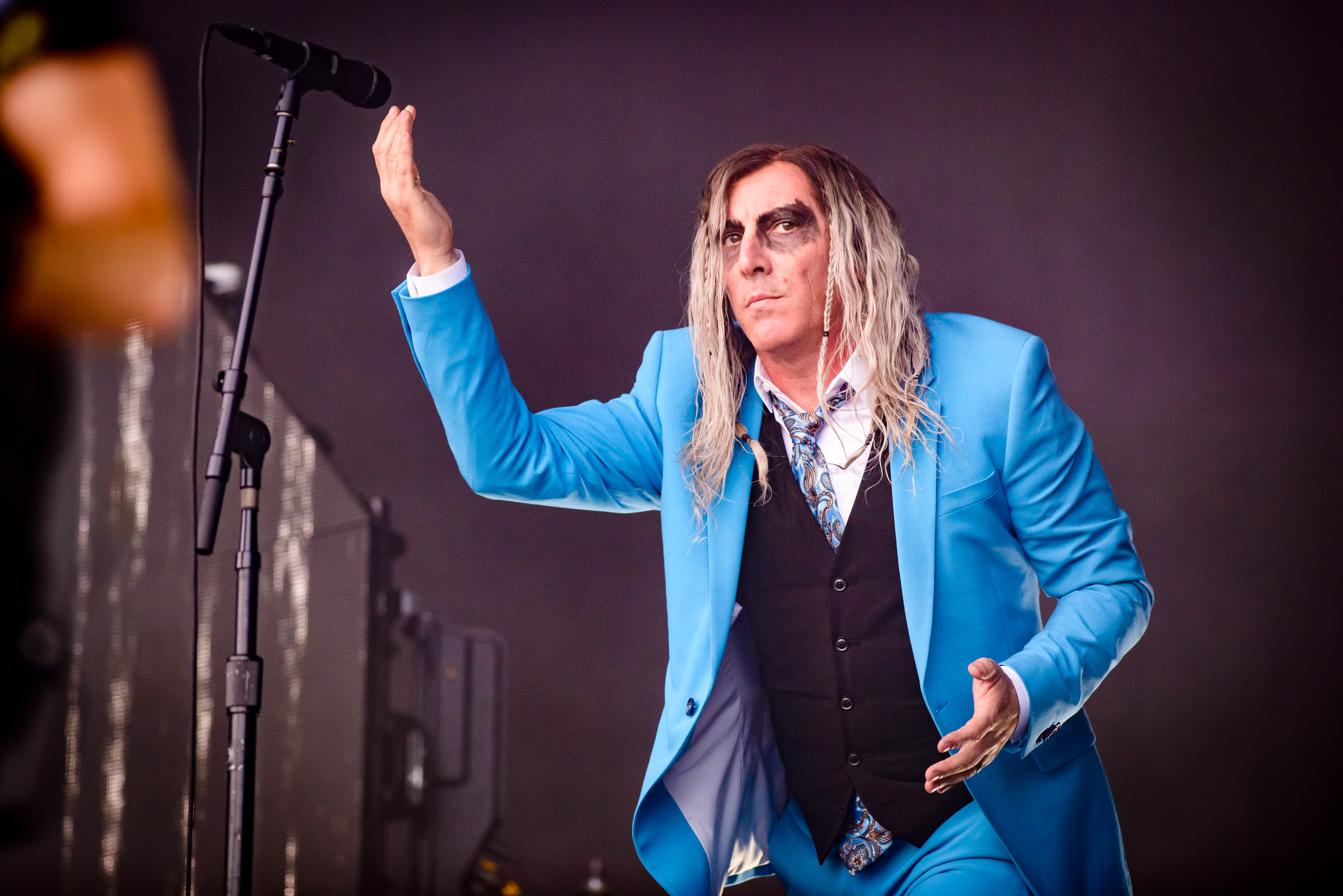 'Rock im Park 2018; Zeppelinfeld Nürnberg': 'A Perfect Circle'